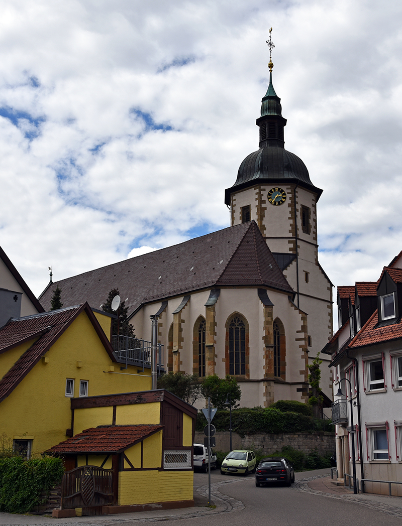 Januariuskirche in Oßweil von Südosten